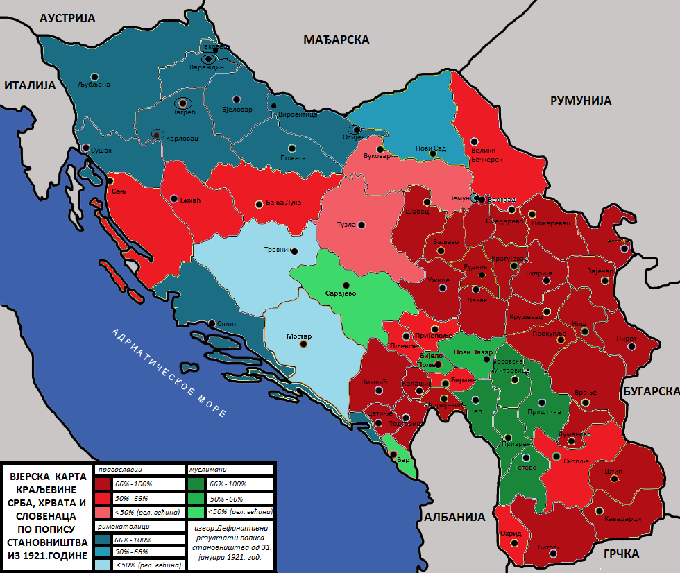 Вјерска карта Краљевине Југославије према попису становништва из 1921. године